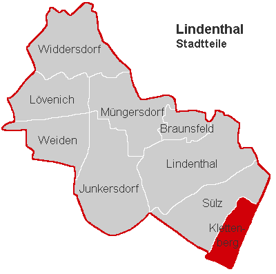 Lagekarte Klettenberg im Stadtbezirk Köln-Lindenthal